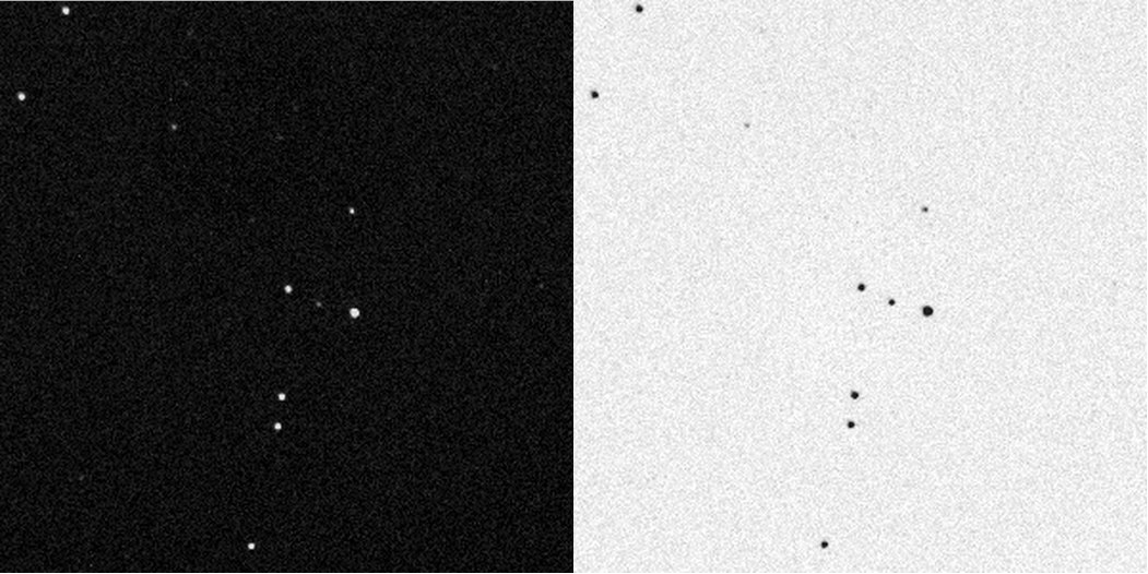 Chapas fotográficas antigas de alguma região do espaço, uma negativa e uma postiva.